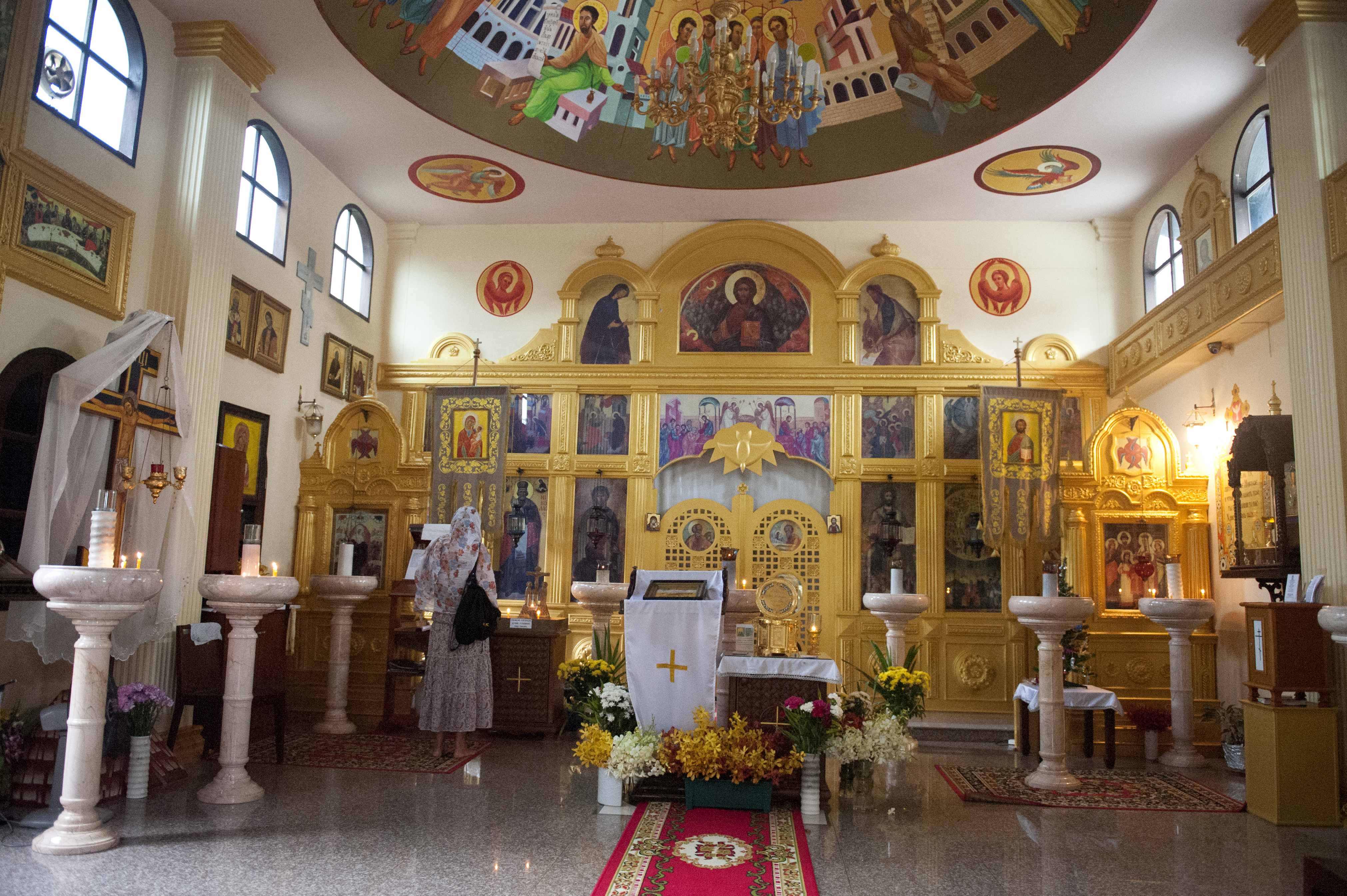 Паттайя